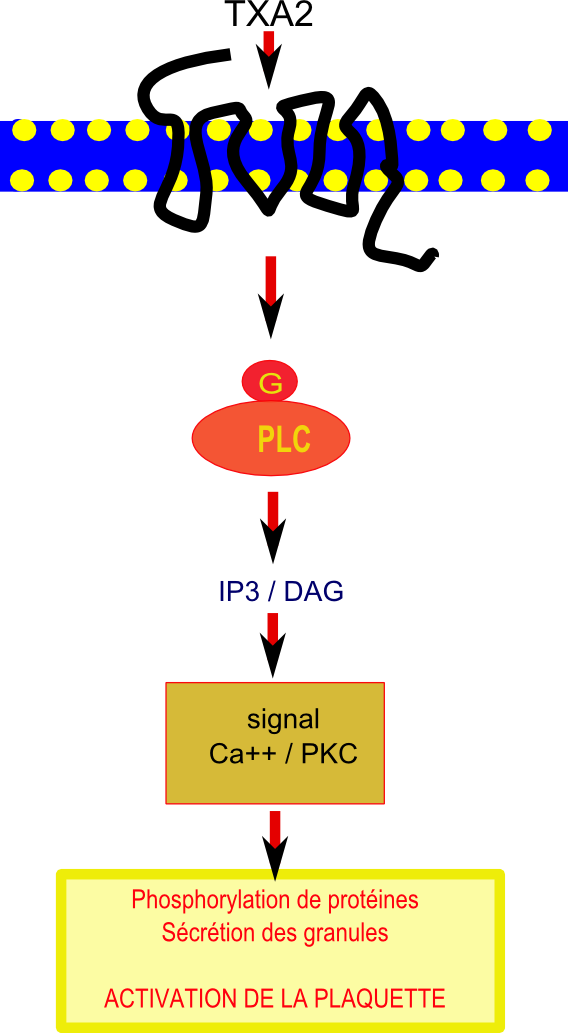 voie de transduction du signal inhibé par le resvératrol